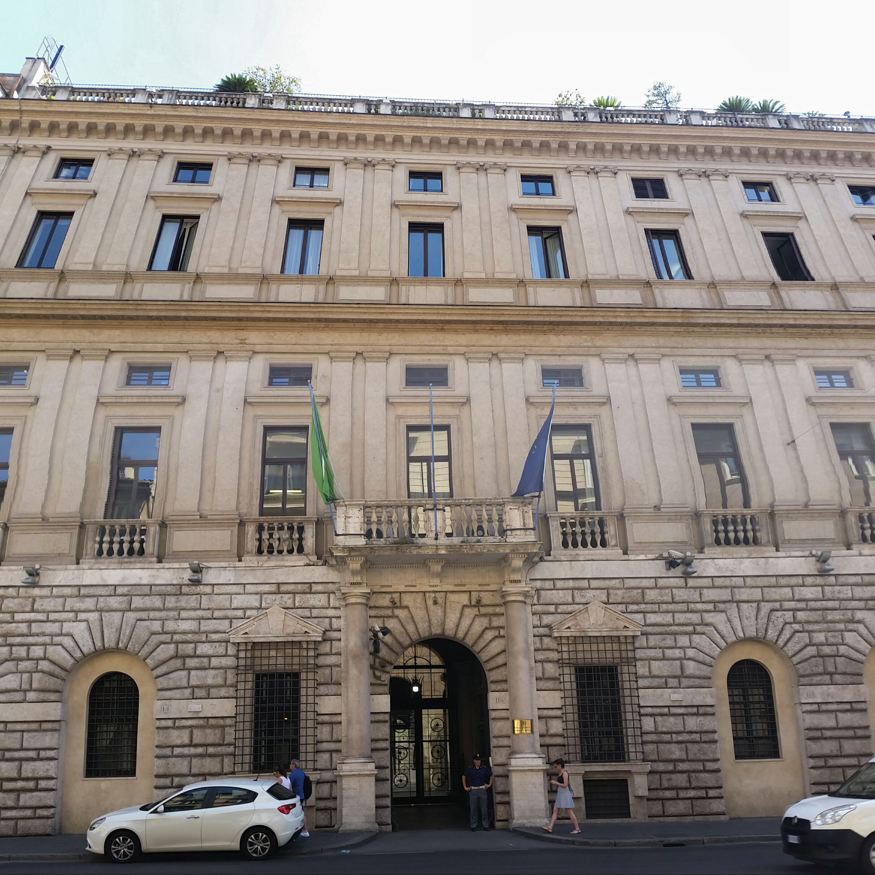 Palazzo Vidoni a Roma, sede del Dipartimwnto della Funzione Pubblica.